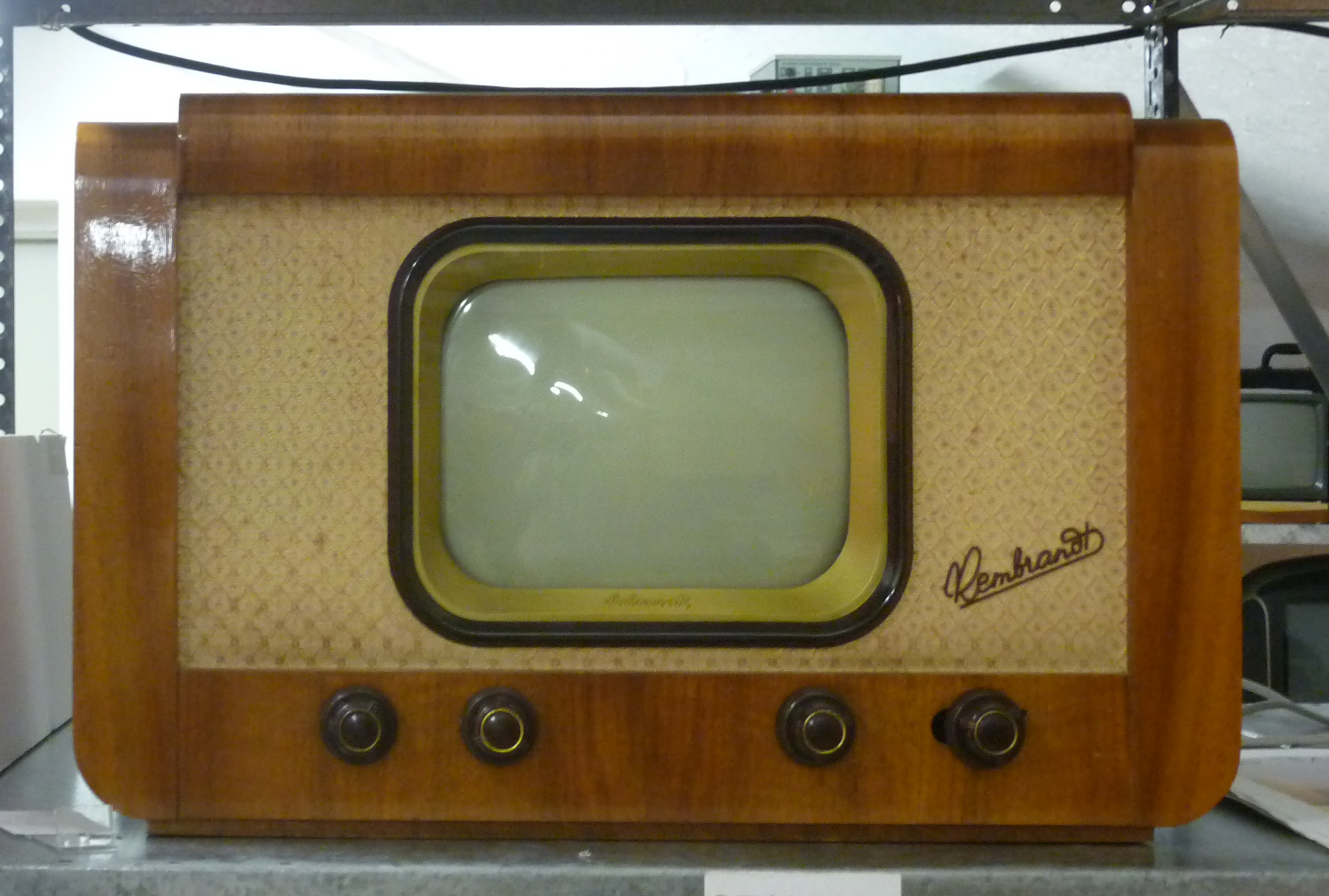 Technische Sammlungen Dresden: Fernsehgerät "Rembrandt" (erste Eigenentwicklung von RAFENA Radeberg)